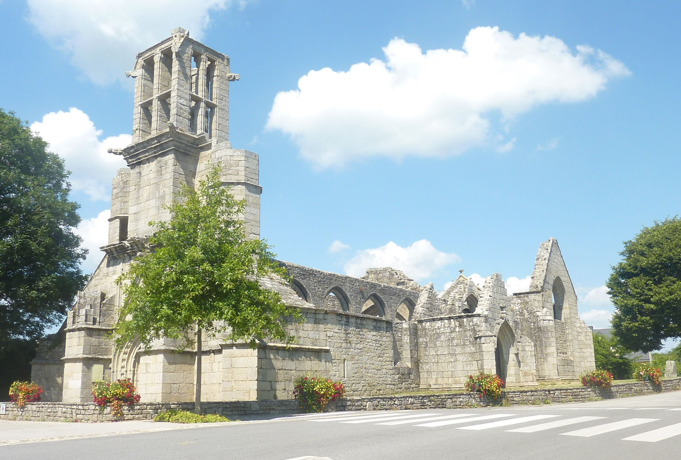 La chapelle Saint-Jacques de Lambour, ancienne église tréviale en ruines dont le clocher a été décapité à la suite de la Révolte des Bonnets rouges